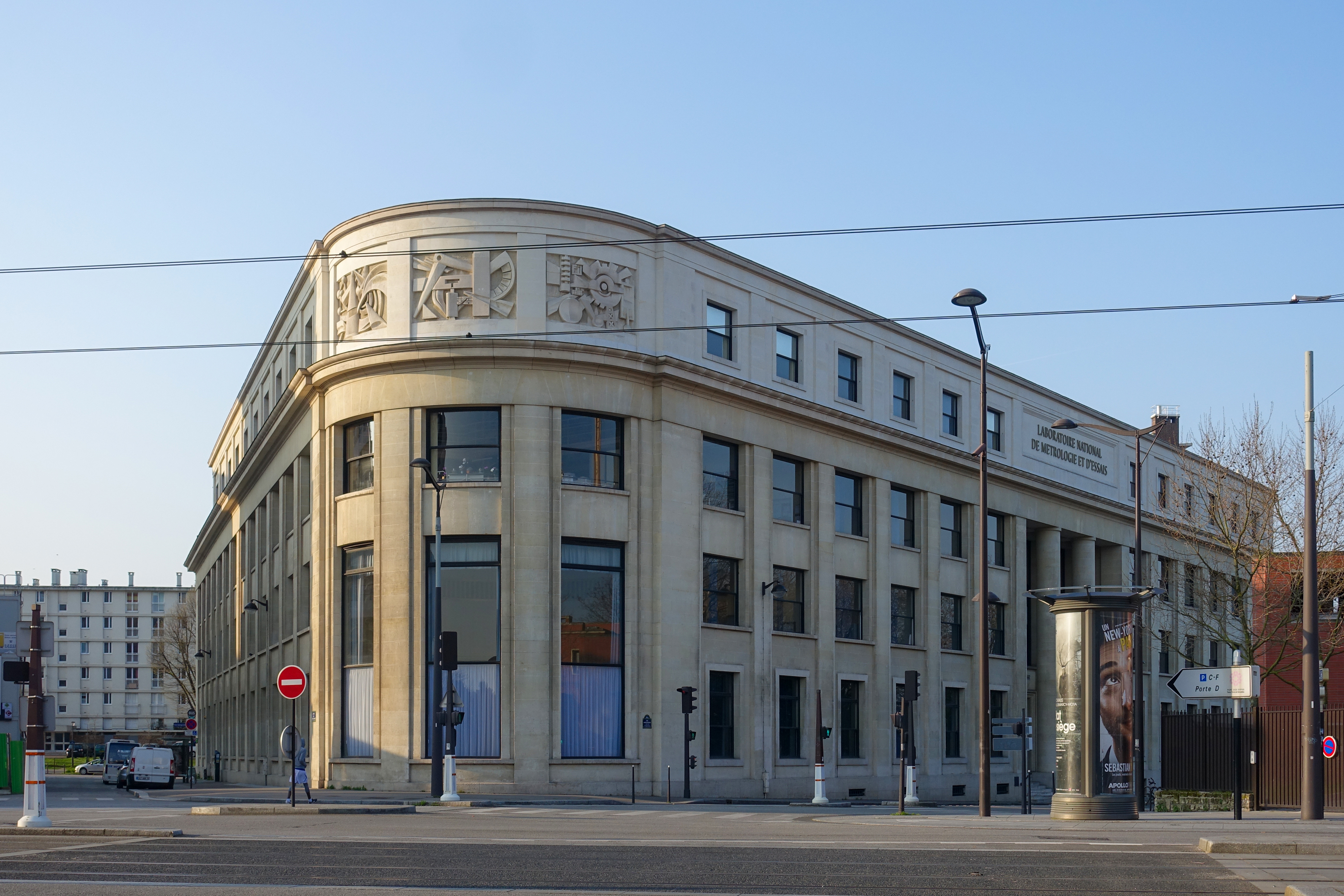 Laboratoire national de métrologie et d'essais @ Paris